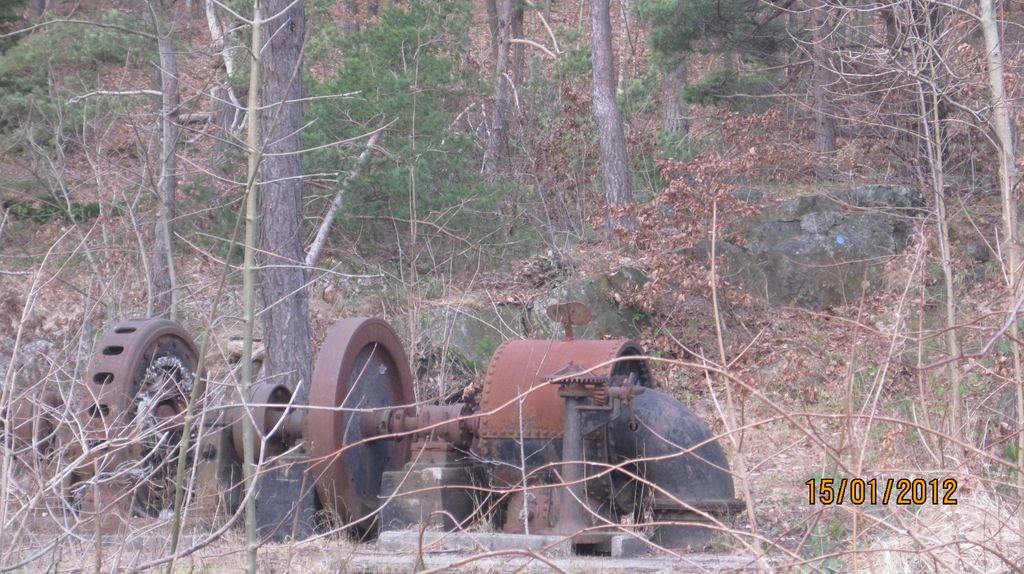 Lillesand første elektrisitetsverk - Kulturminne 2012